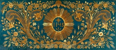 Manifattura ligure (seconda metà del XVIII secolo) ; Paliotto di paglia naturale, ritagliata e incollata su tela blu e che è decorata tutta di paglia naturale (88 × 201cm). Conservato al museo di Vita Cappuccina, Genova - Italia.